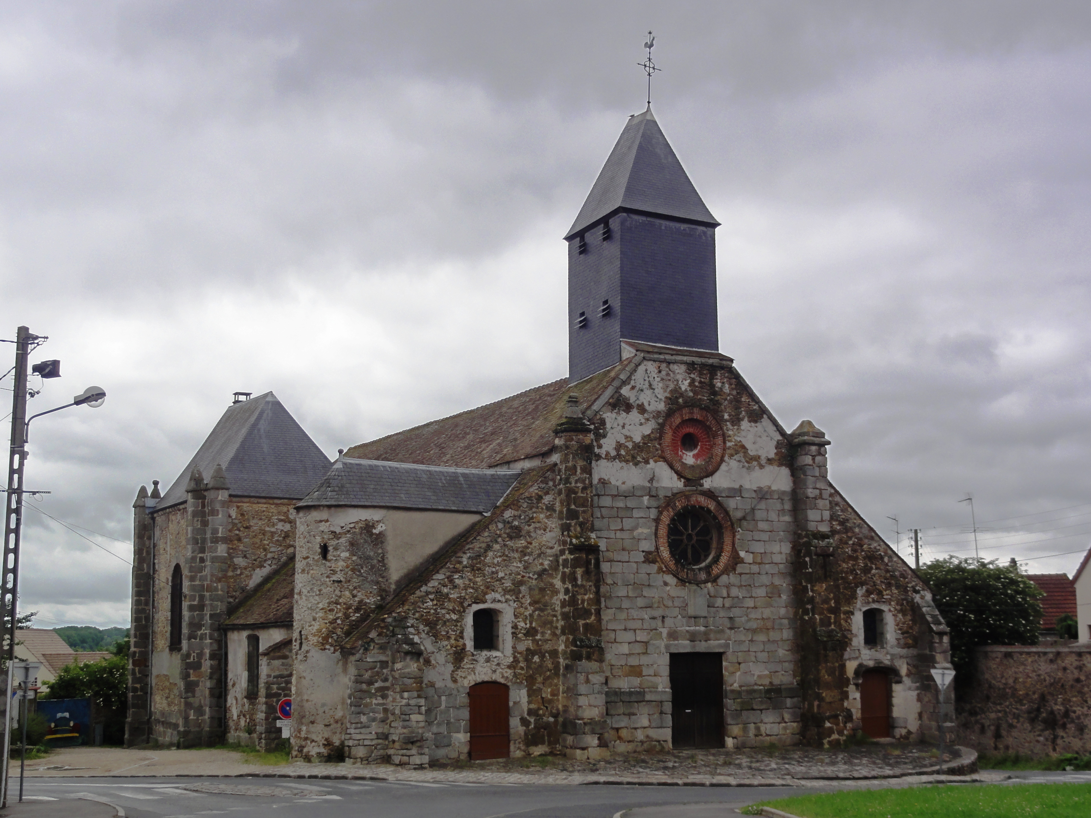 Leuville-sur-Orge (Essonne) Église